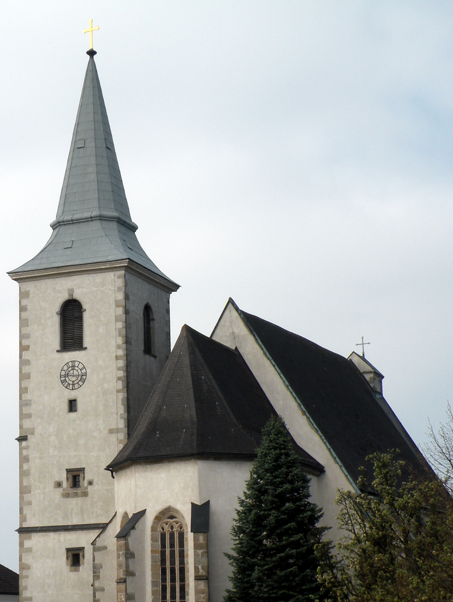 Pfarrkirche in Allerheiligen im Mühlkreis Ostansicht